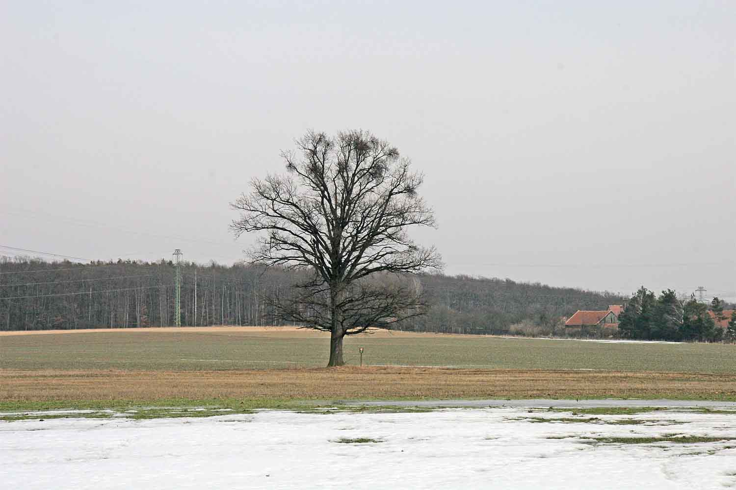 Památný dub letní u Bělušic